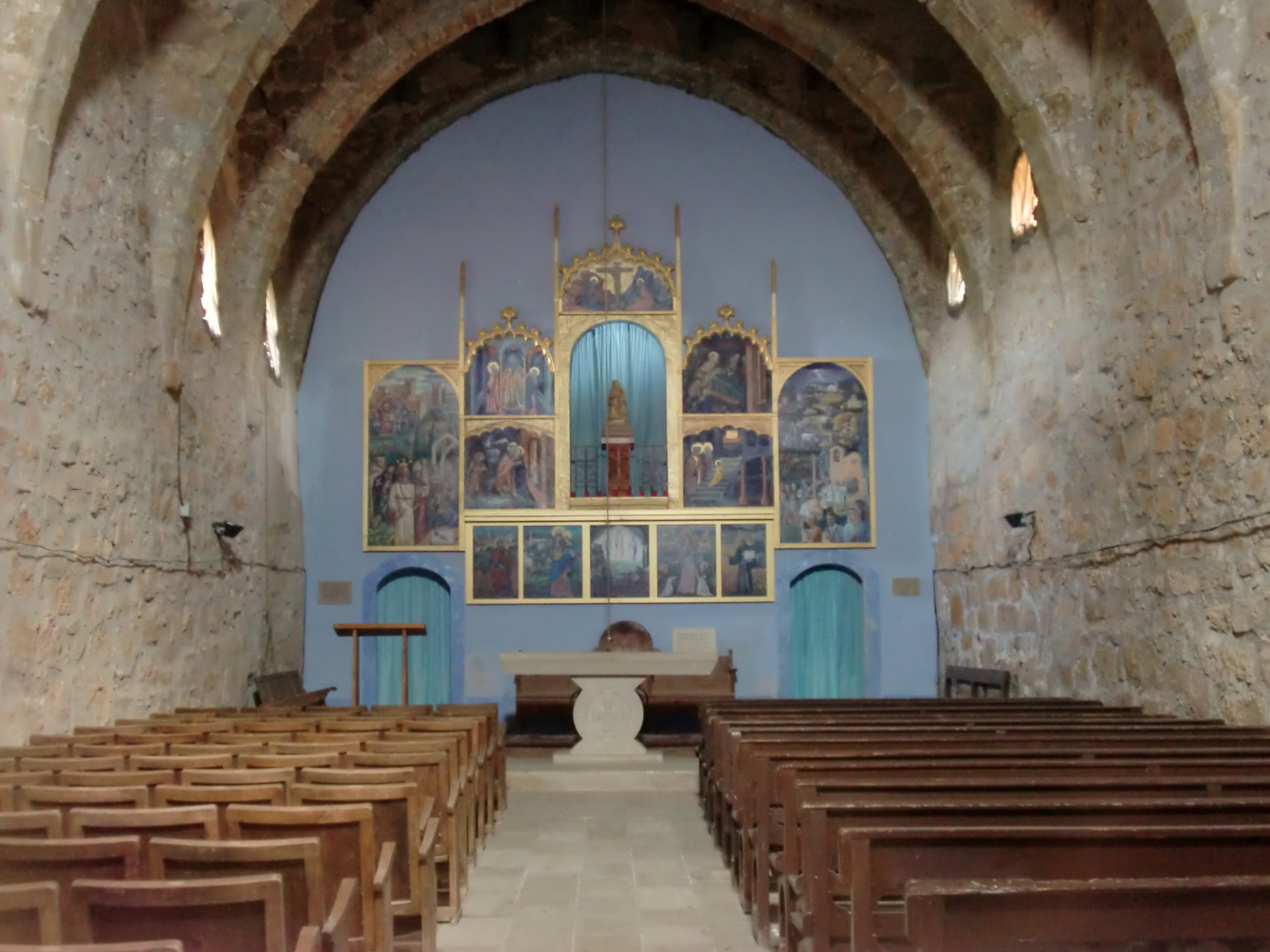 Interior de l'ermita de Santa Anna de Montornès (Prenafeta, Montblanc)